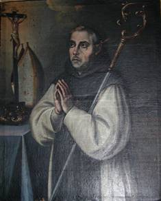 Retrato de fray Diego de Yepes con hábito jerónimo, mitra y báculo, símbolos de su profesión, dignidad y estado, que se halla en el convento de Santa Ana de Tarazona (OCD).